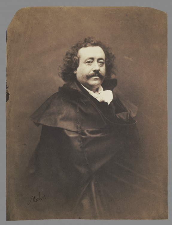 Benoît-Hermogaste Molin (1810-1894) par Nadar 57,5 x 75 cm.